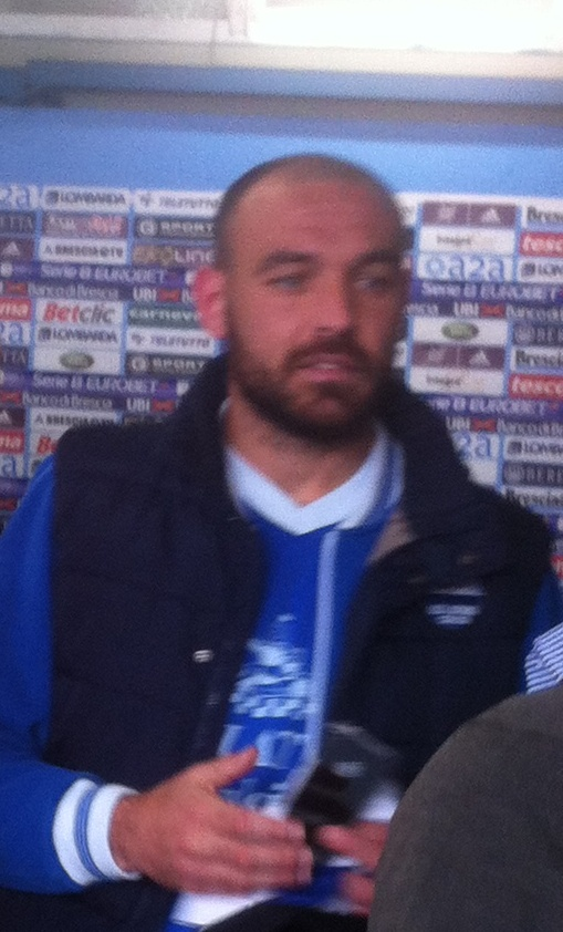 Il calciatore Alessandro Bruno